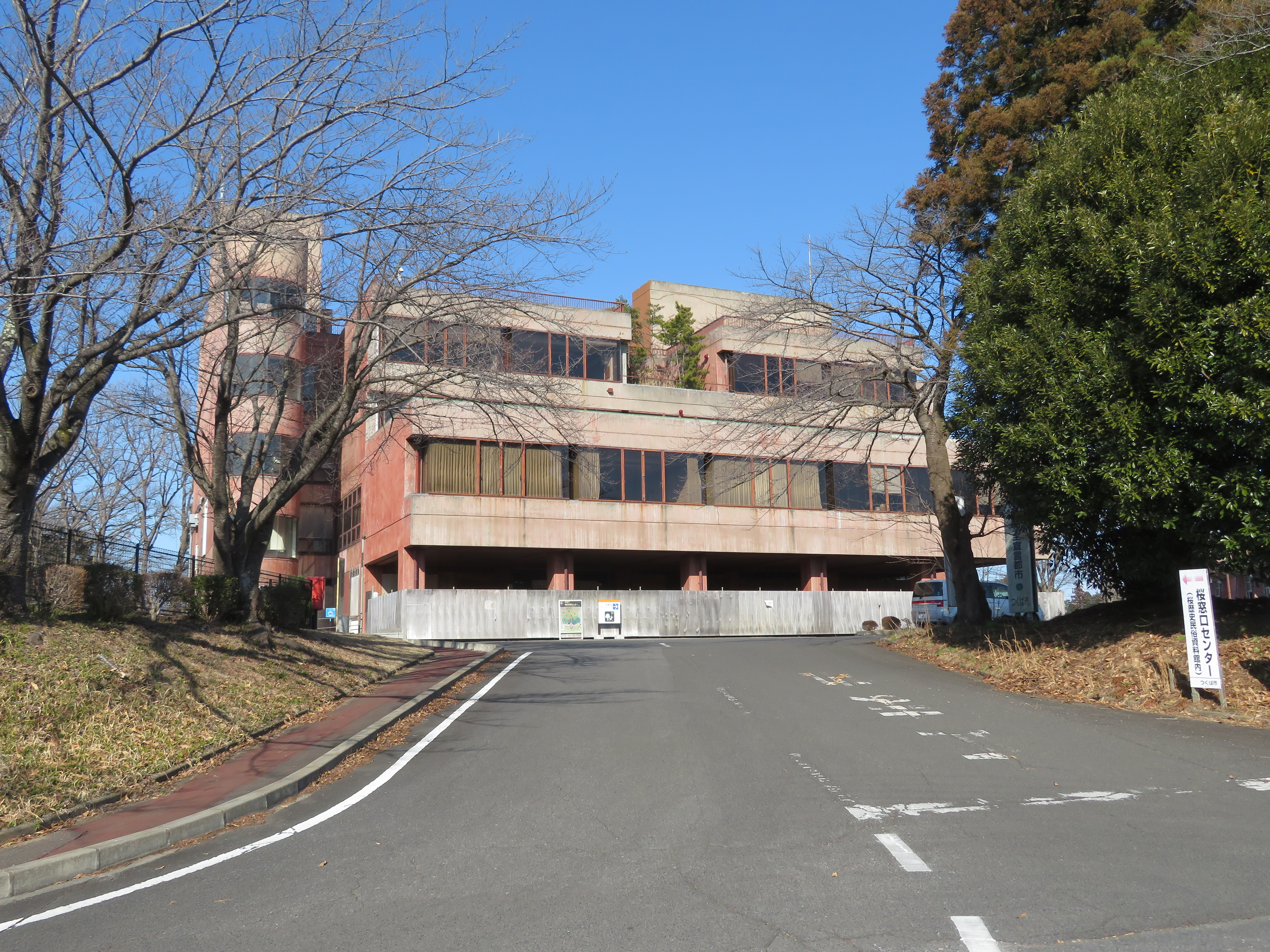 茨城県つくば市にある桜窓口センター旧庁舎（旧桜村役場） Canon PowerShot SX720 HS